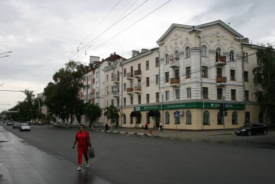 Тамбов, Советская улица